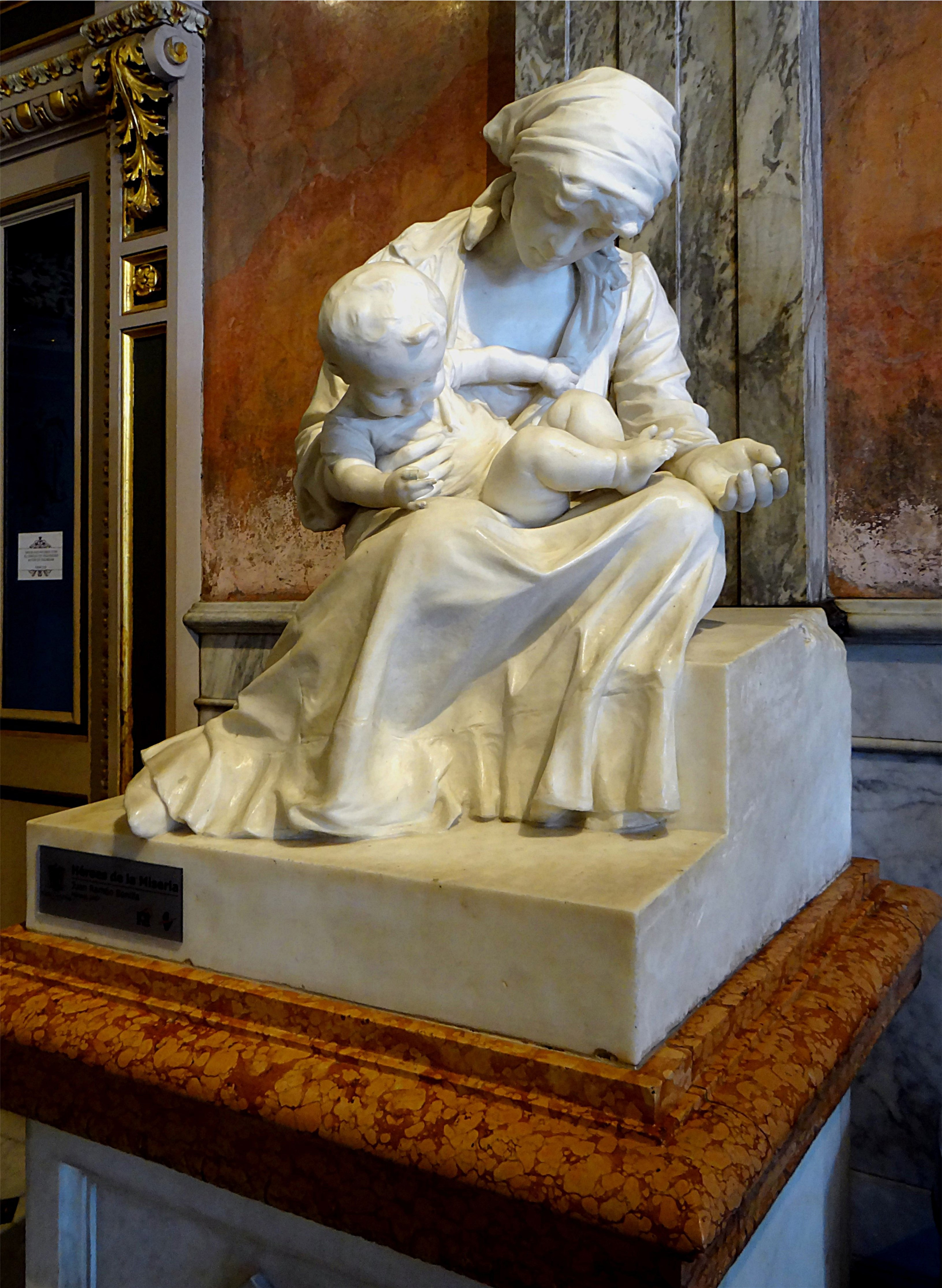 Théâtre National, statue intitulée "Héroes de la miseria" par Juan Ramon Bonilla (1907), San José, Costa Rica.